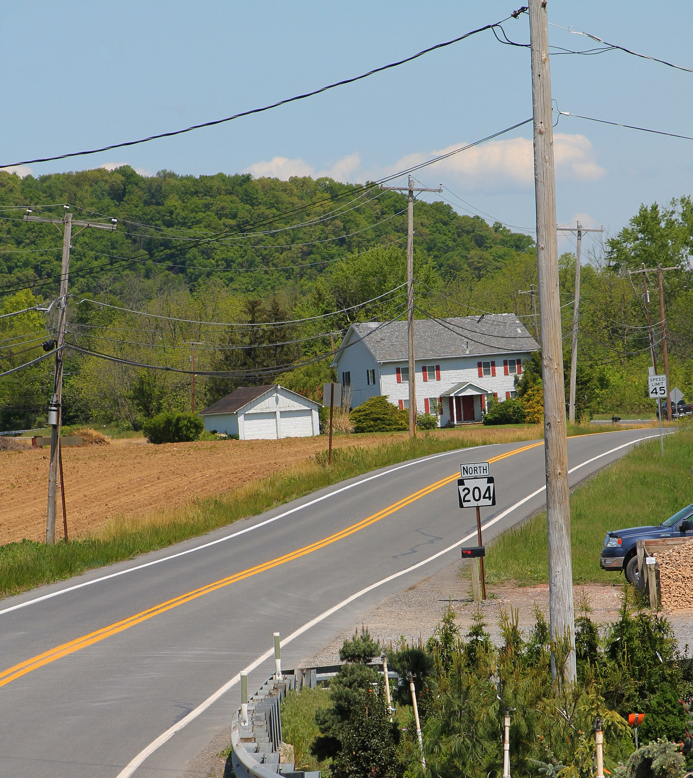 Pennsylvania Route 204 in Snyder County, Pennsylvania.